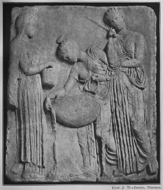 Medea und die Peliaden bereiten die “Verjüngung” des Pelias vor. Gipsabguss einer römischen Kopie des attischen Reliefs aus dem 5. Jahrhundert v. Chr.